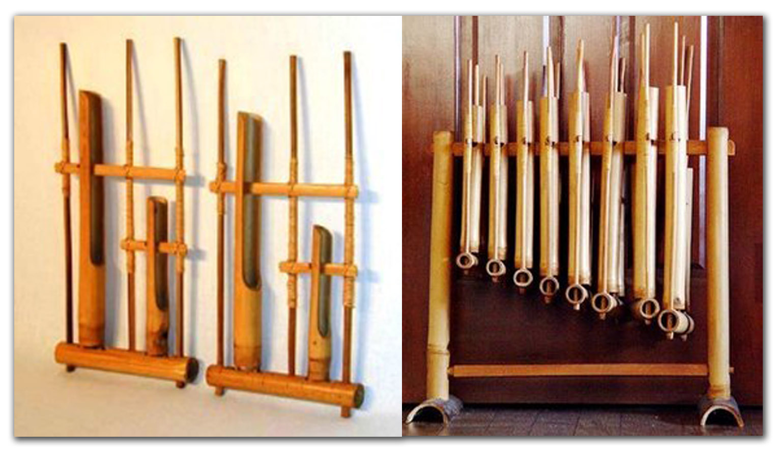 Angklung